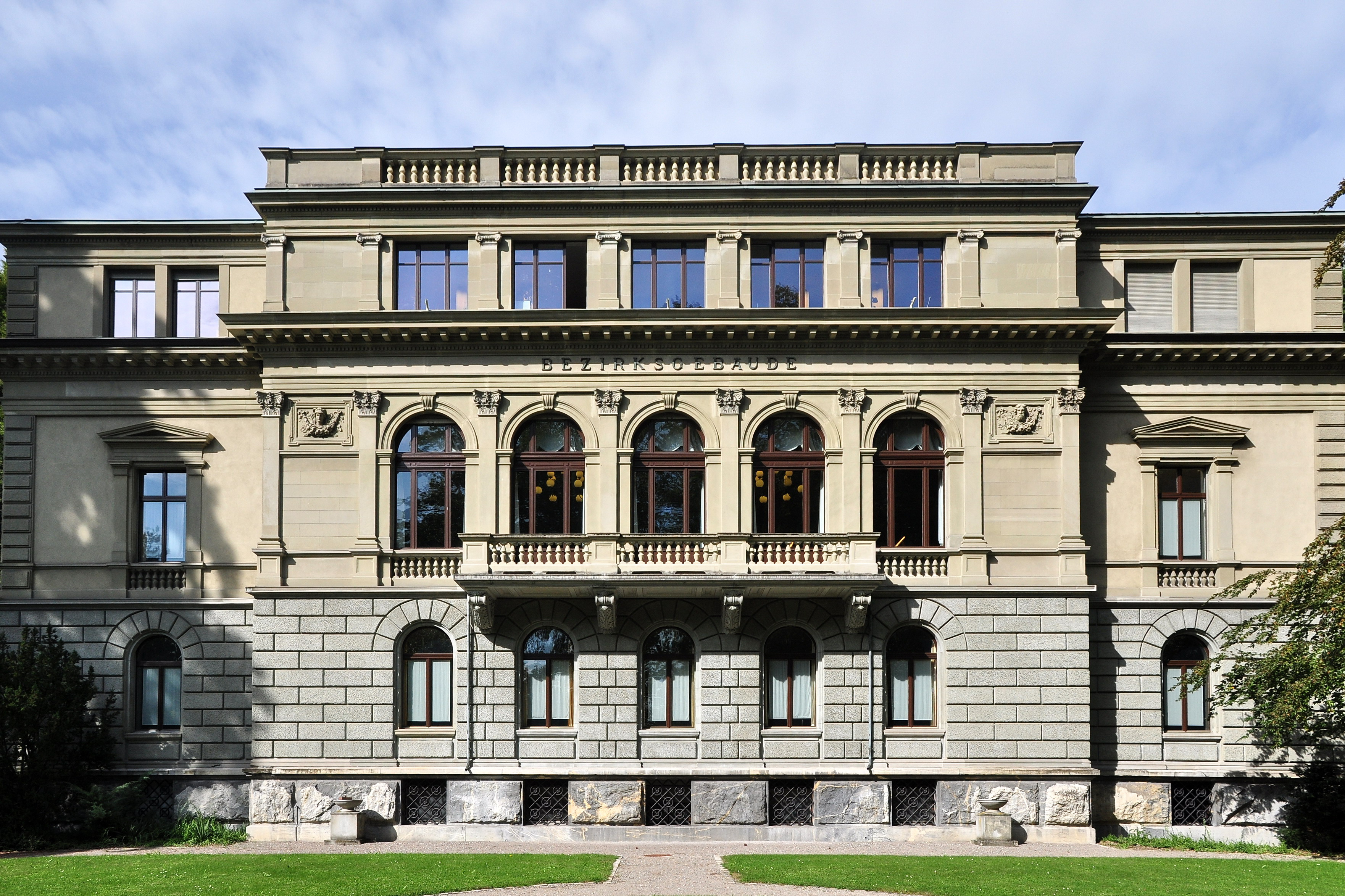 Altes Bezirksgebäude, Lindstrasse 10 in Winterthur (Switzerland)